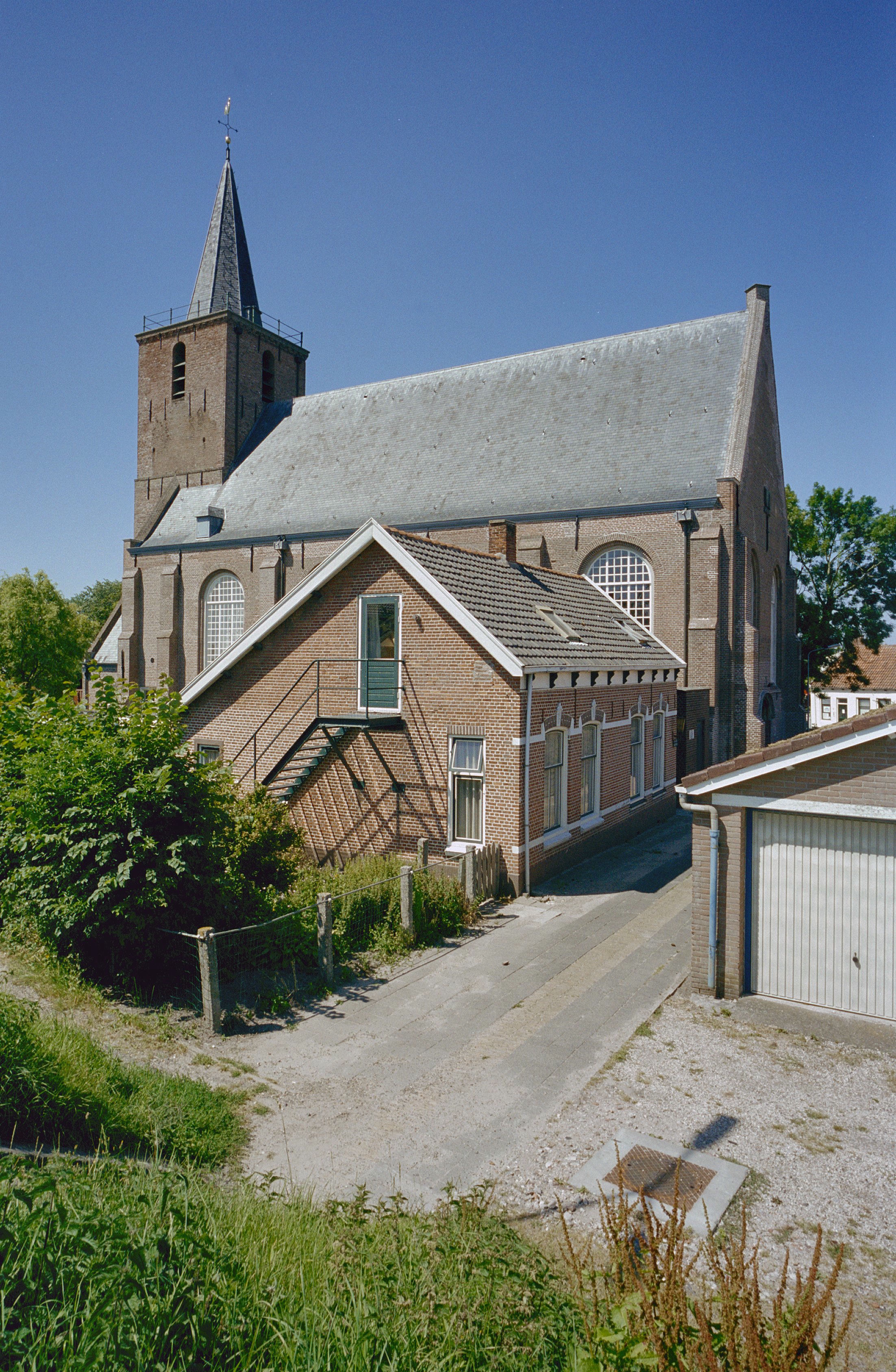 Nederlands Hervormde Kerk: Overzicht gedeelte toren